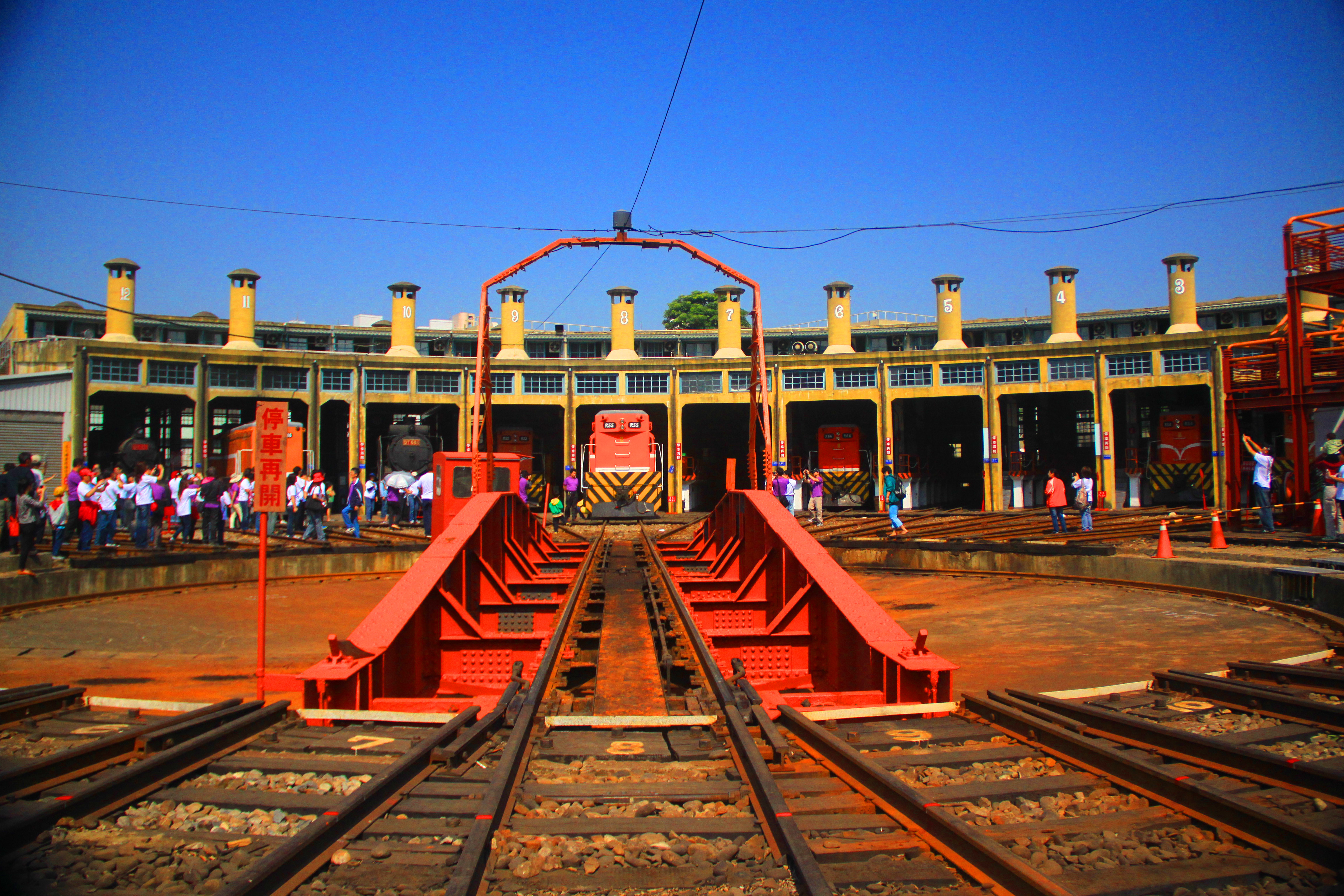 彰化扇形車庫由12個軌道及1個轉向盤所構成的，可同時停放12輛火車頭並藉由360度選轉的轉向盤，主要用途是能在最快的時間內調動車頭方向，具有歷史價值與意義。